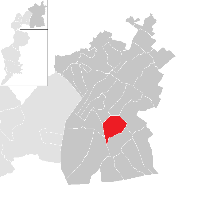 Bezirk Neusiedl am See